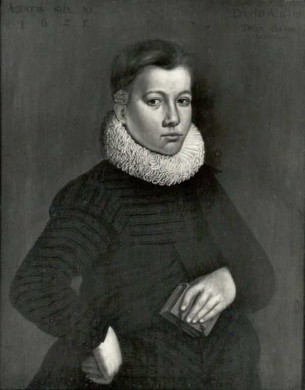 Porträt David von Büren (1614-1659)